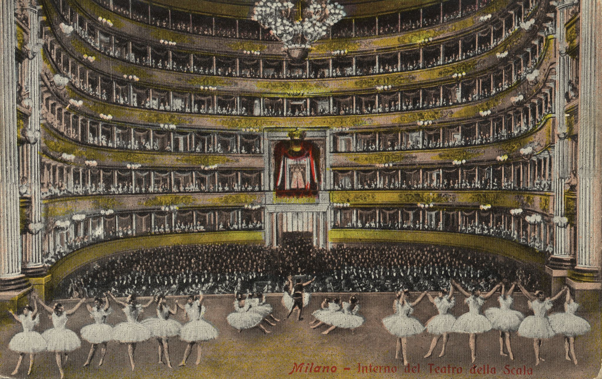 Zuschauerraum im Teatro alla Scala in Mailand